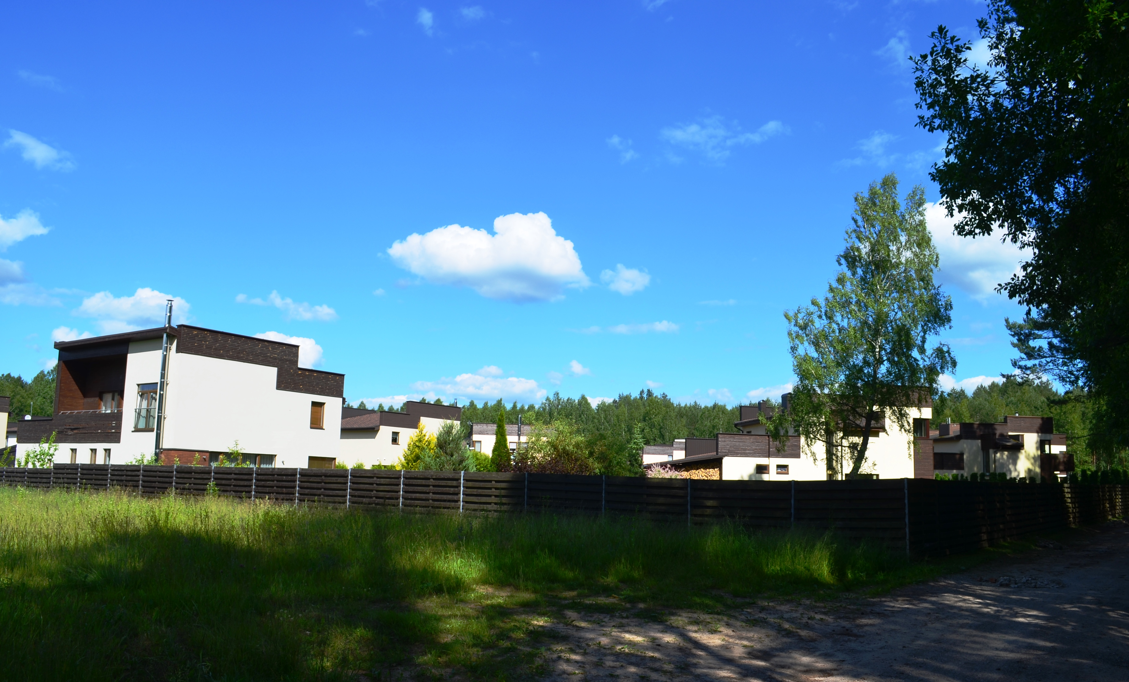 Zamečkavas, Vilniaus raj.